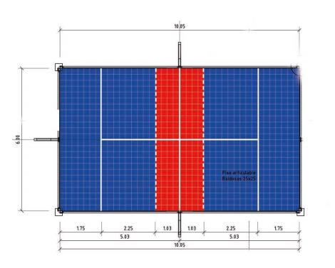 Areas de juego en el Padbol